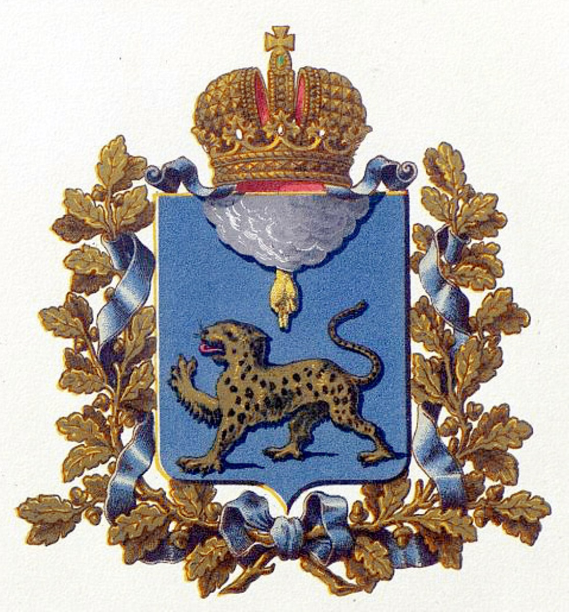 Official Russian Empire coat of arms Pskov Governorate. Герб Российской Империи Псковской губернии в Гербовнике Бенке. Утверждён Императором Всероссийским Александром Вторым.